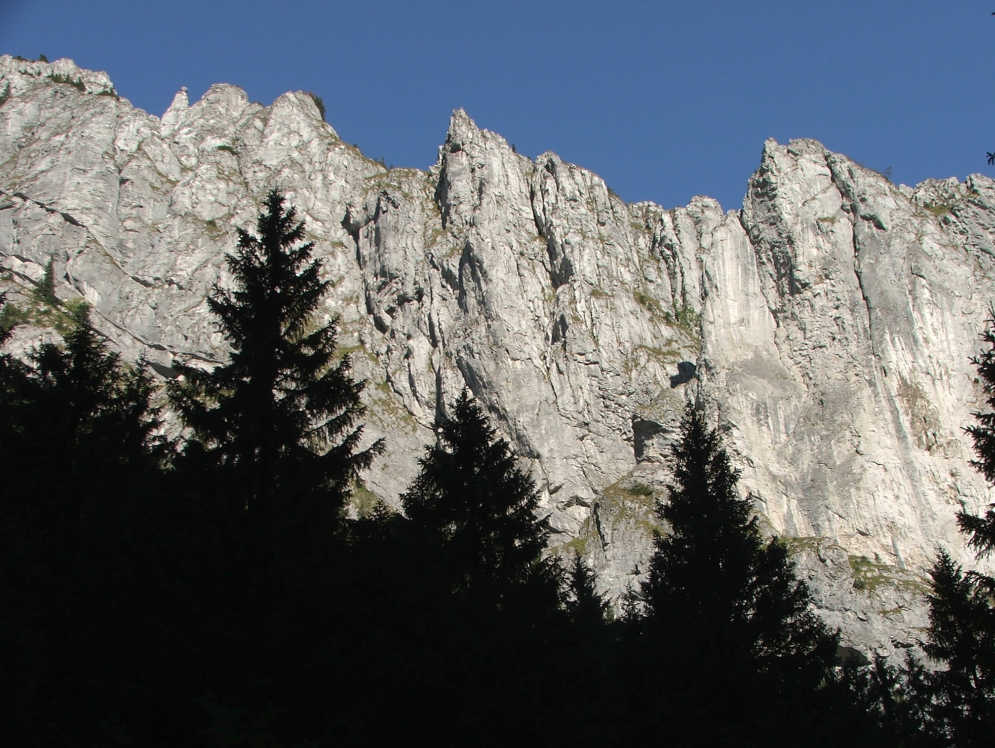 Raptawicki Mur (Tatra Mountains)